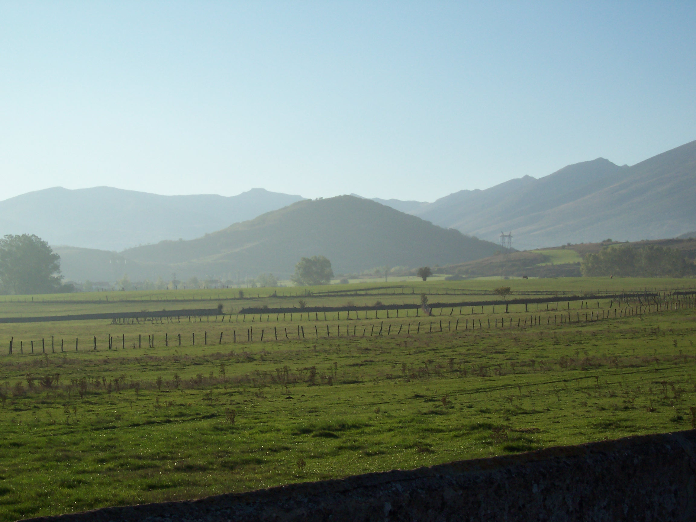 Sierra del Cordel (derecha) y sierra de Híjar (izquierda) vistas de Campoo de Suso (Cantabria)